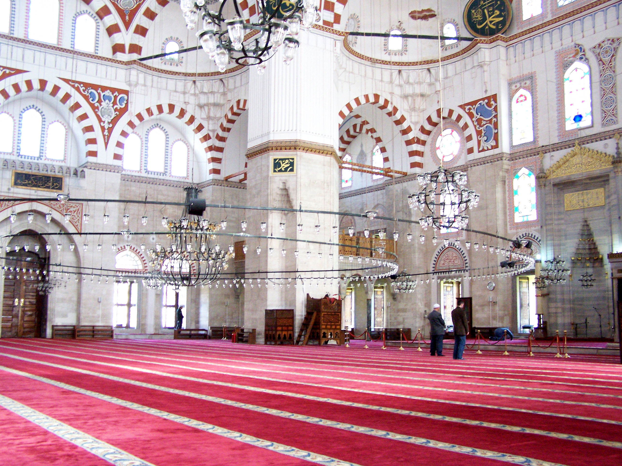 Interior of Şehzade Camii in Fatih, İstanbul, Turkey